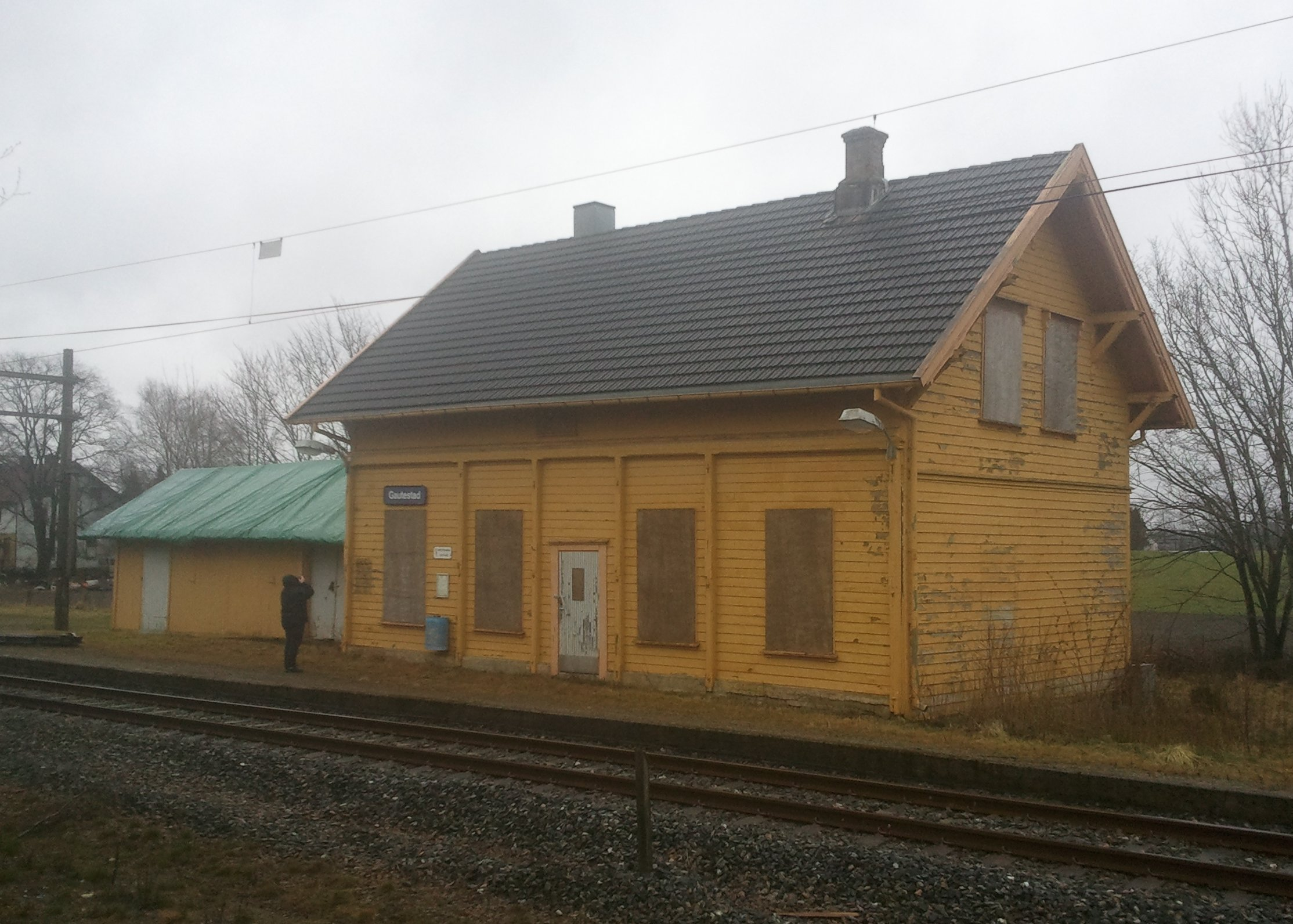 Gautestad stasjon, april 2014